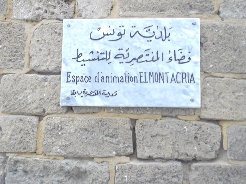 La médina de Tunis مدينة تونس العتيقة